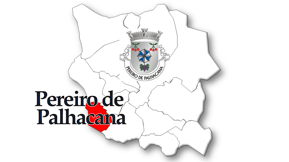 Evolução da População